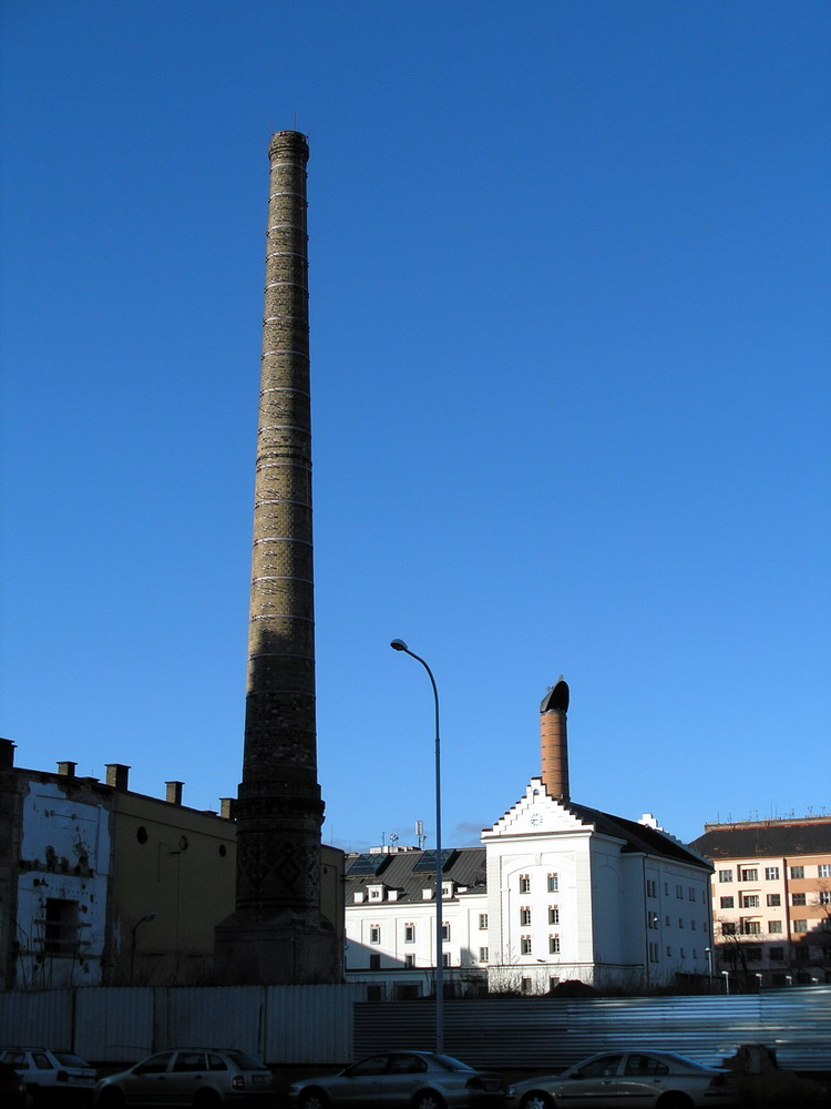 Komín pivovaru v Praze-Holešovicích.